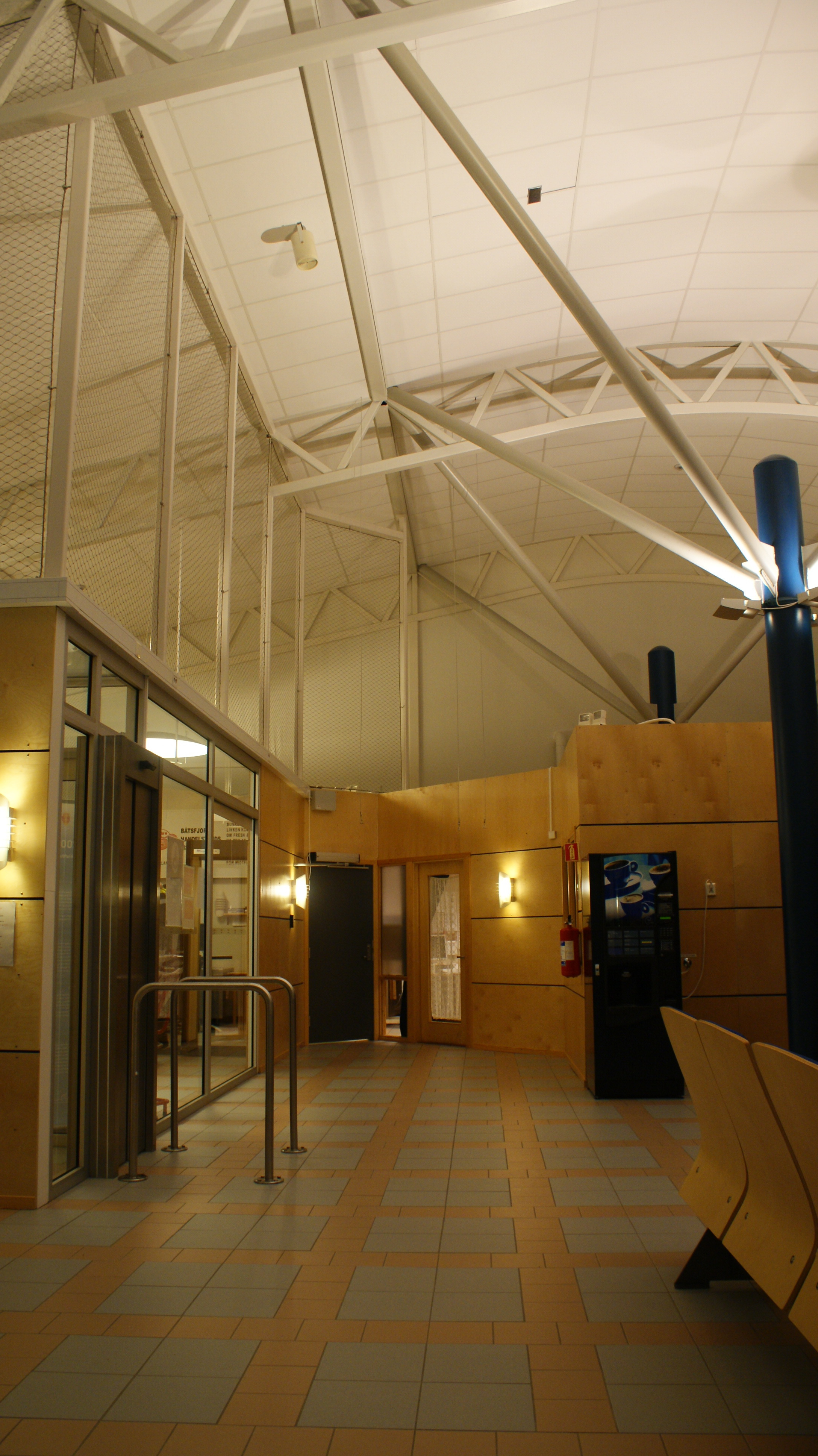 Båtsfjord Airport, Varangerhalvøya, Finnmark, Norway. Terminal hall: airside.